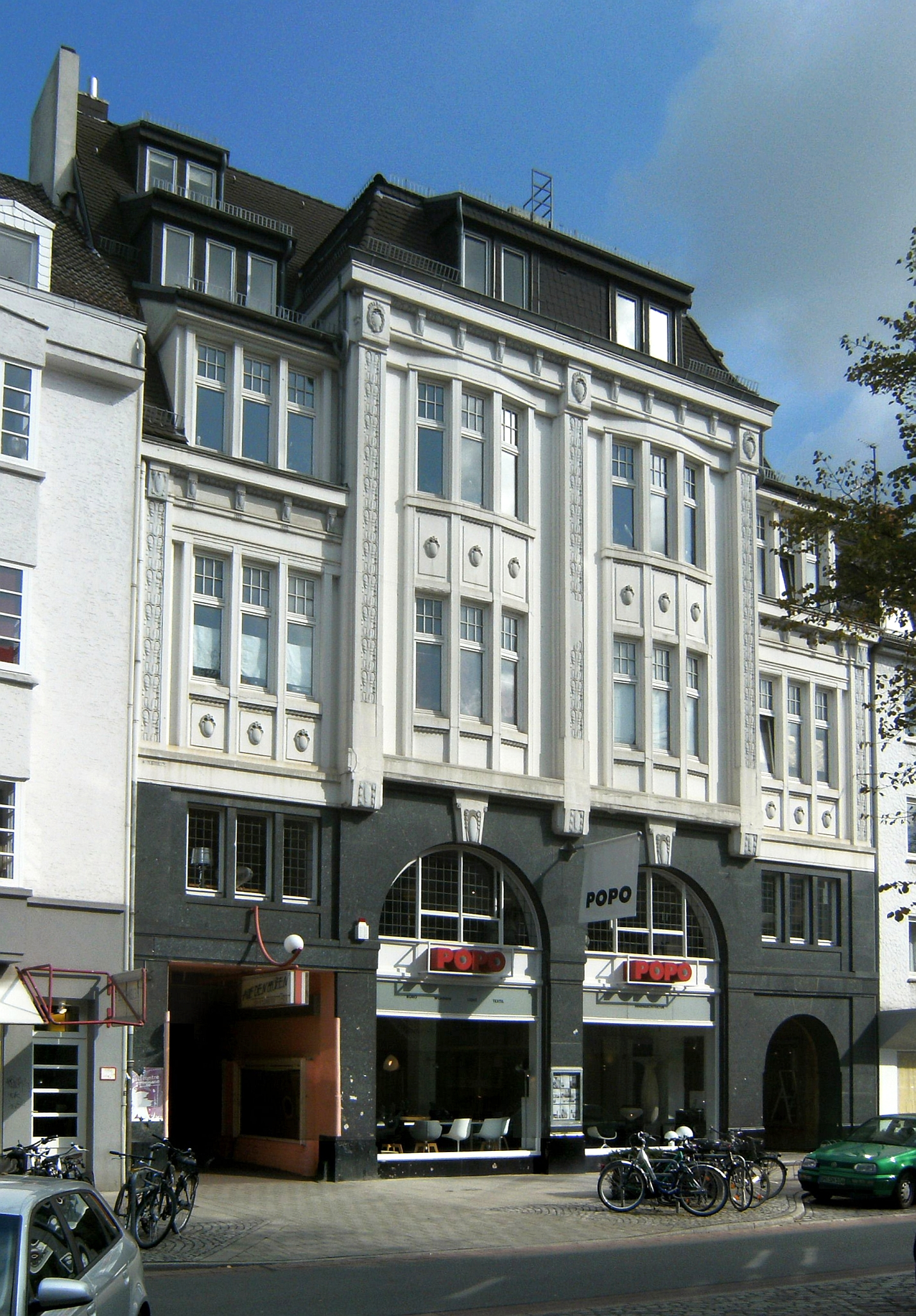 Geschäftshaus Wachsmuth in Bremen, Auf den Häfen 12.Das abgebildete Objekt ist ein geschütztes Kulturdenkmal in der Freien Hansestadt Bremen, mit der Nr. 0095 beim Landesamt für Denkmalpflege registriert.